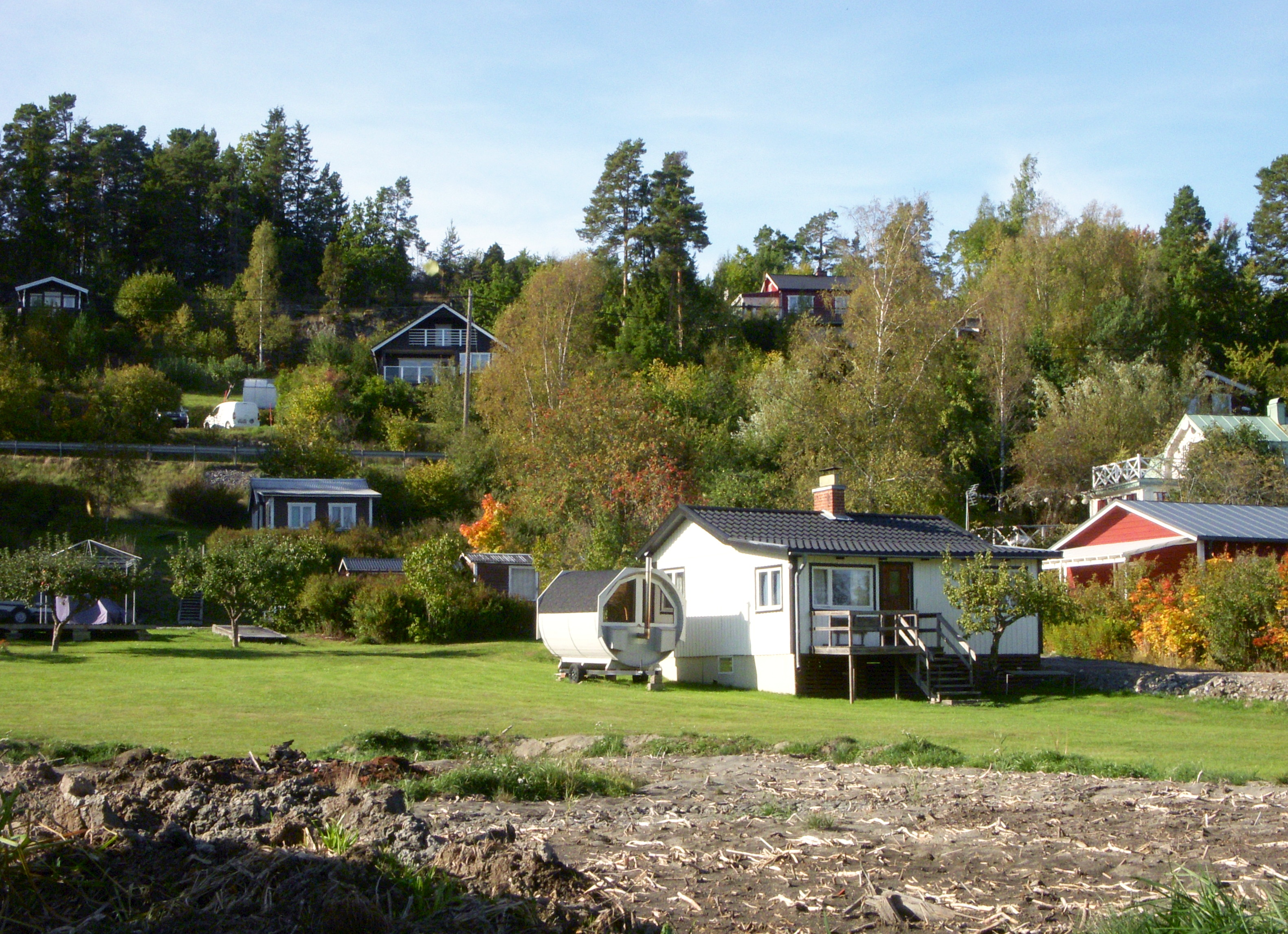 Landfjärdens bebyggelse